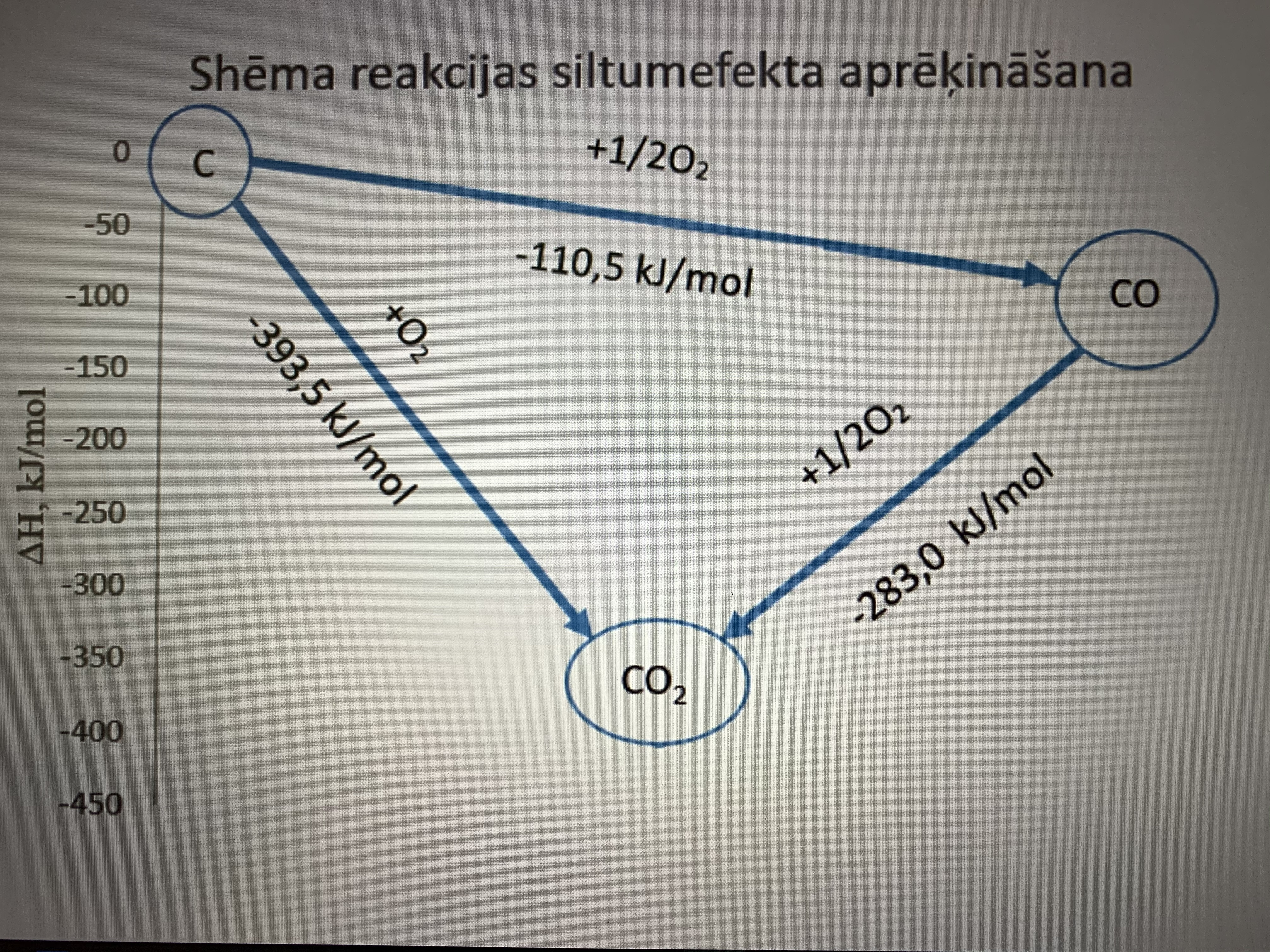 Shēma reakcijas siltumefekta aprēķināšana.